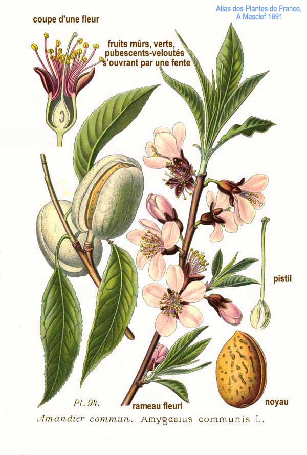 Prunus dulcis (Mill.) D.A.Webb, syn. Amygdalus communis L.